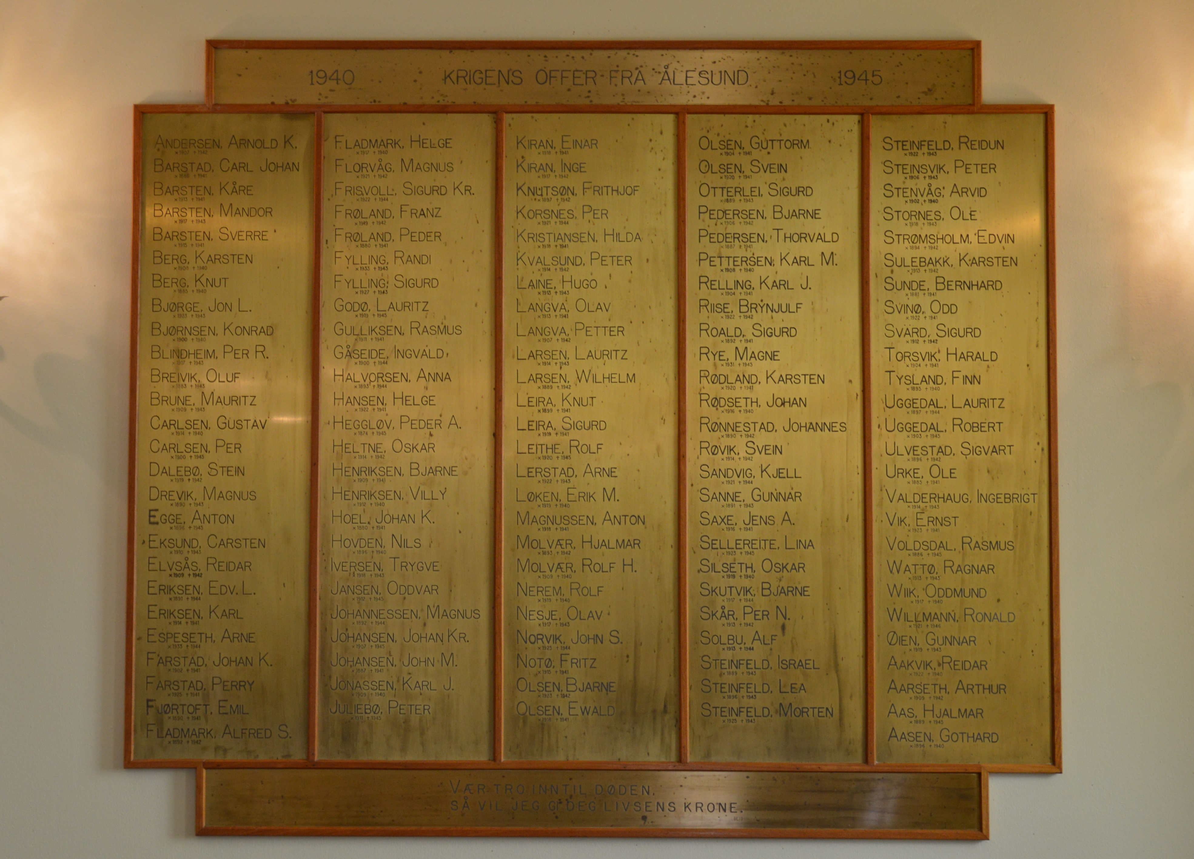 Kirche von Alesund Gedenktafel